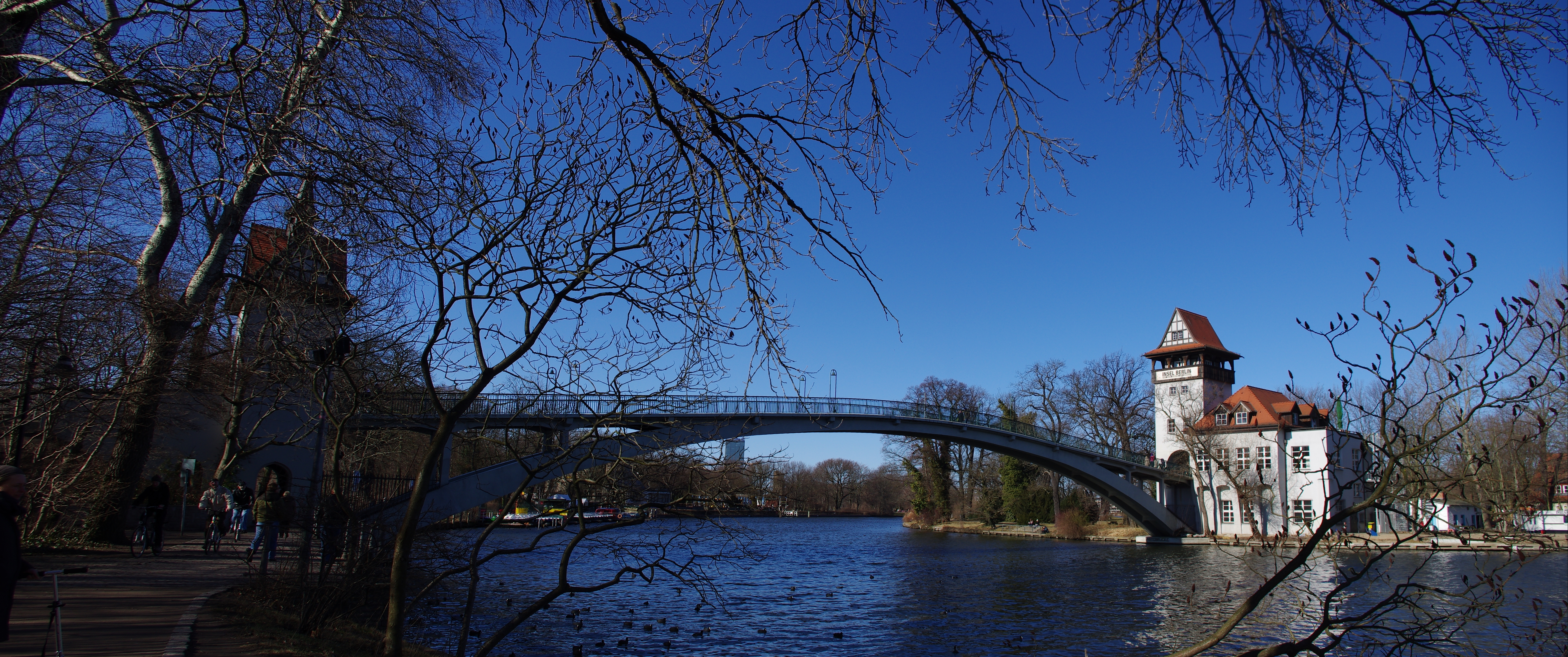 Berlin Ortsteil Alt-Treptow. Die Brücke führt von Alt-Treptow zur Insel der Jugend. Die Brücke steht unter Denkmalschutz.